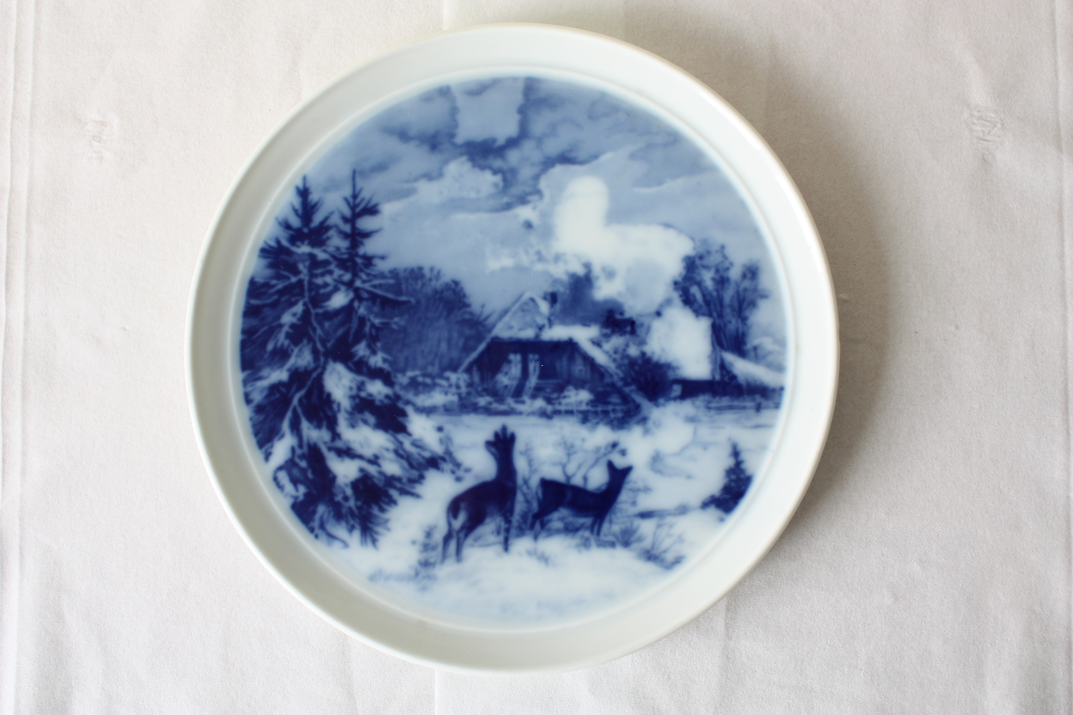 Porzellanfabrik Fraureuth, Germany